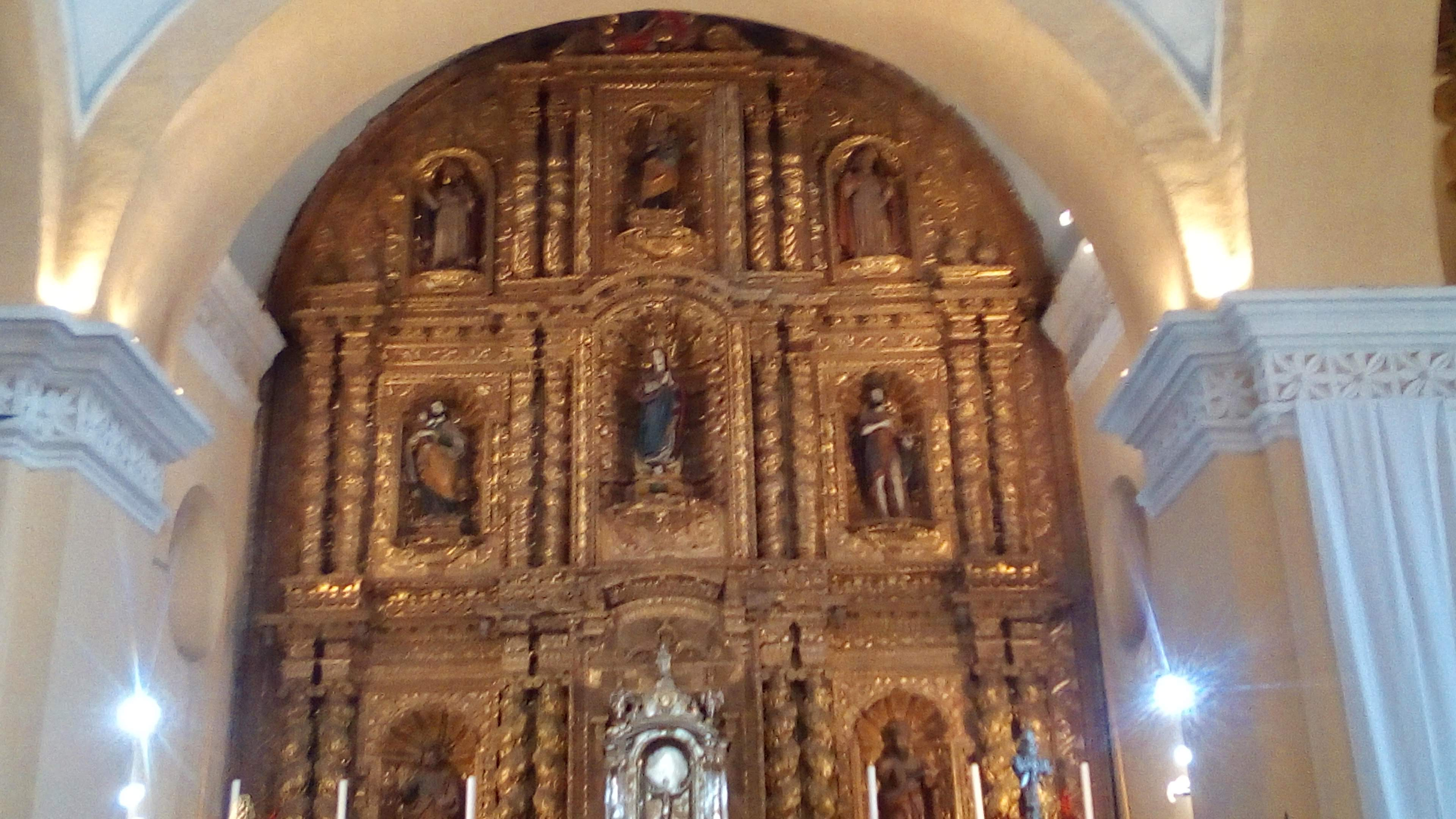 Altar de la Catedral